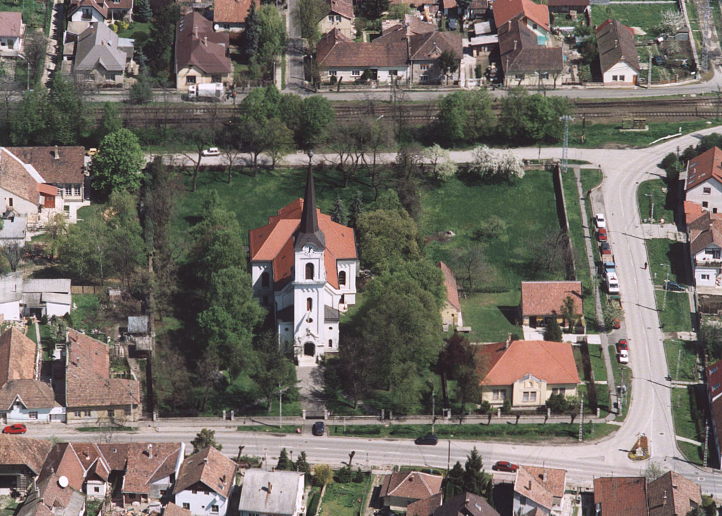 Szent Kereszt felmagasztalása római katolikus templom, Budakalász